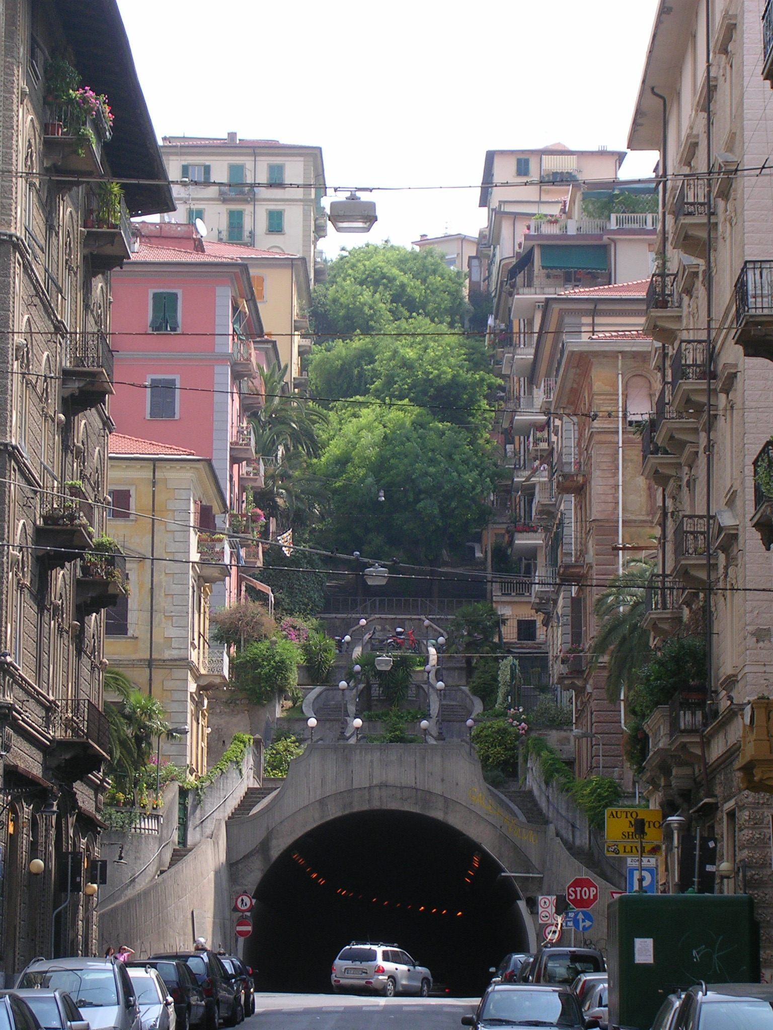 La SpeziaGalleria Spallanzani